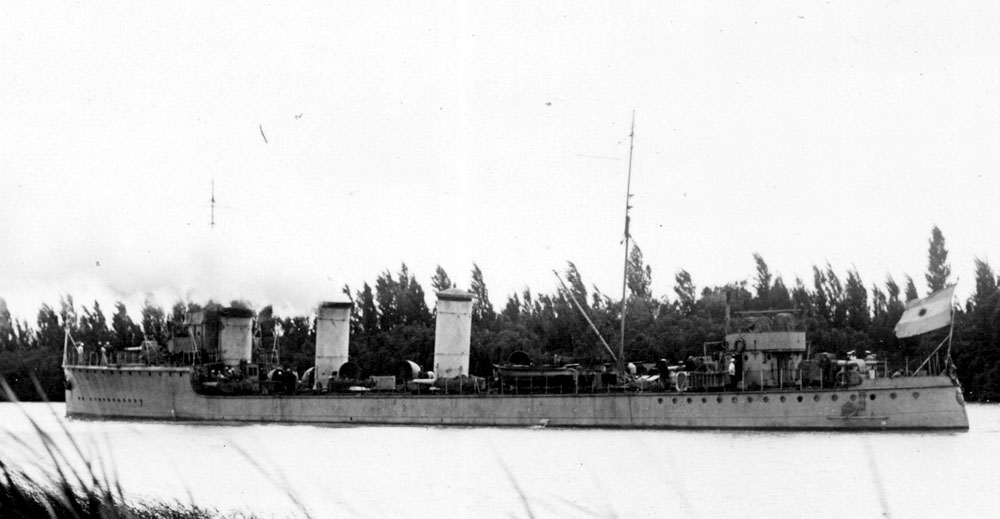 Der in Kiel gebaute argentinische Zerstörer JUJUY